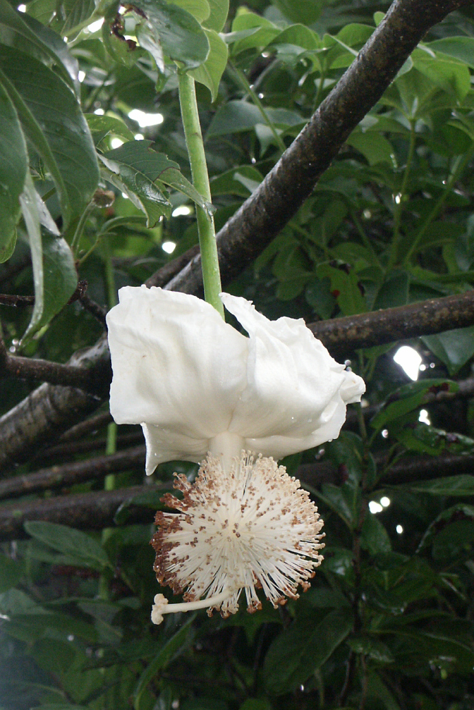 Adansonia digitata in Fairchild Tropical Botanic Garden, Miami, Florida